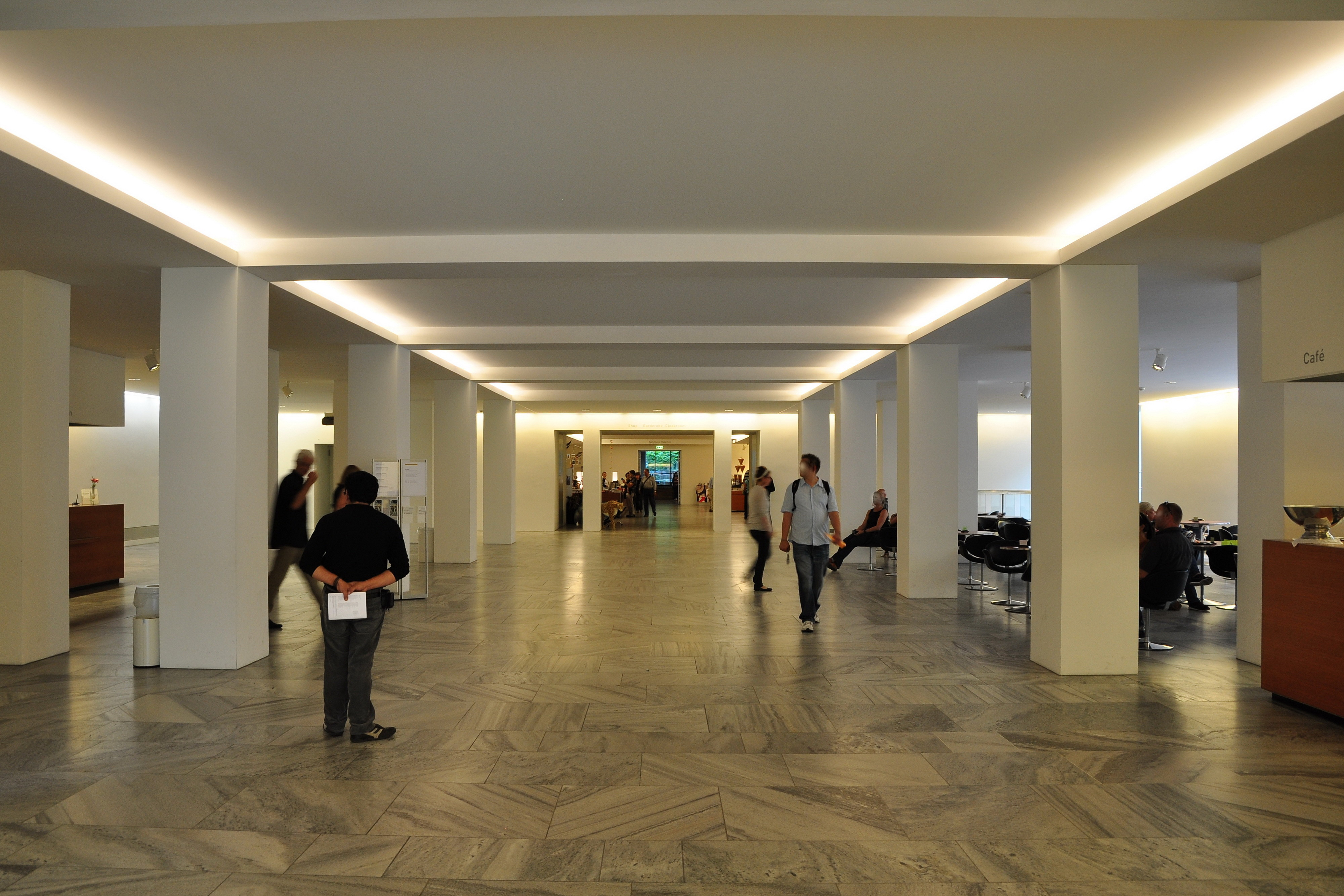 Kunsthaus in Zürich (Switzerland)